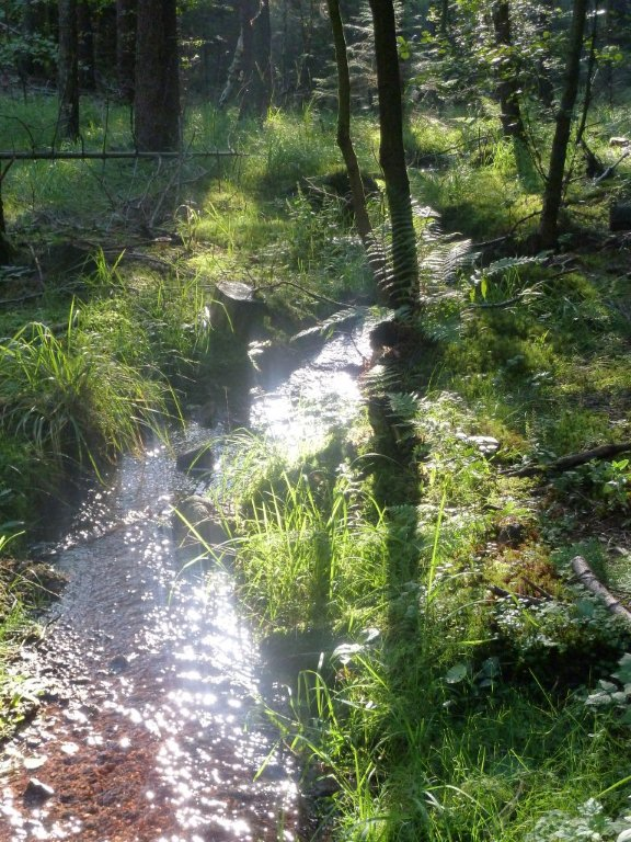 Das Kalte Wasser auf Höhe des Sangeberg